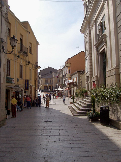 Pietrelcina (BN): vista di via Roma all'altezza della chiesa di Santa Maria degli Angeli